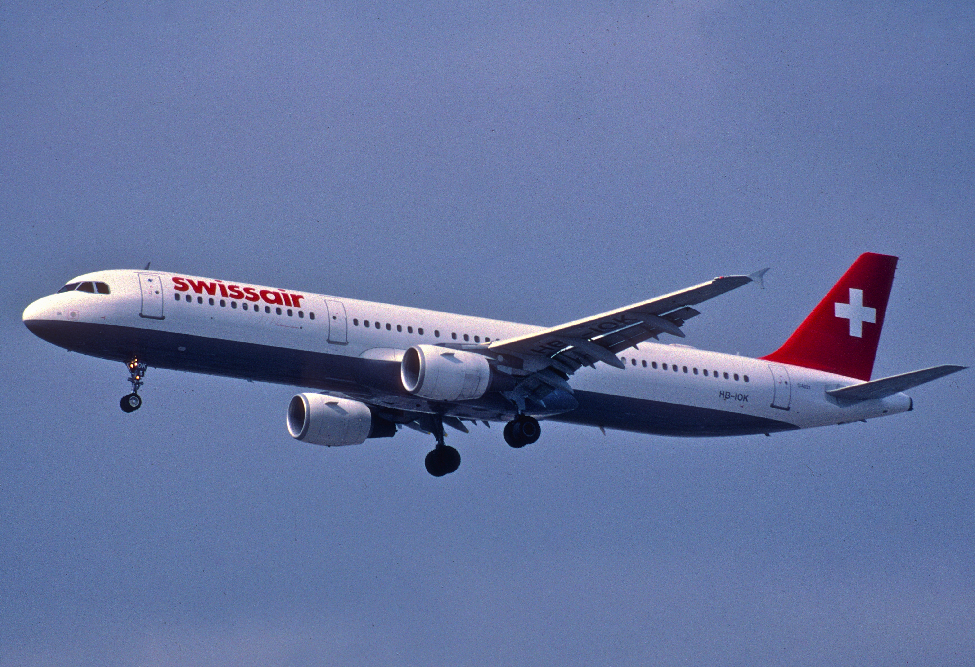 95ci - Swissair Airbus A321-111; HB-IOK@LHR;01.06.2000